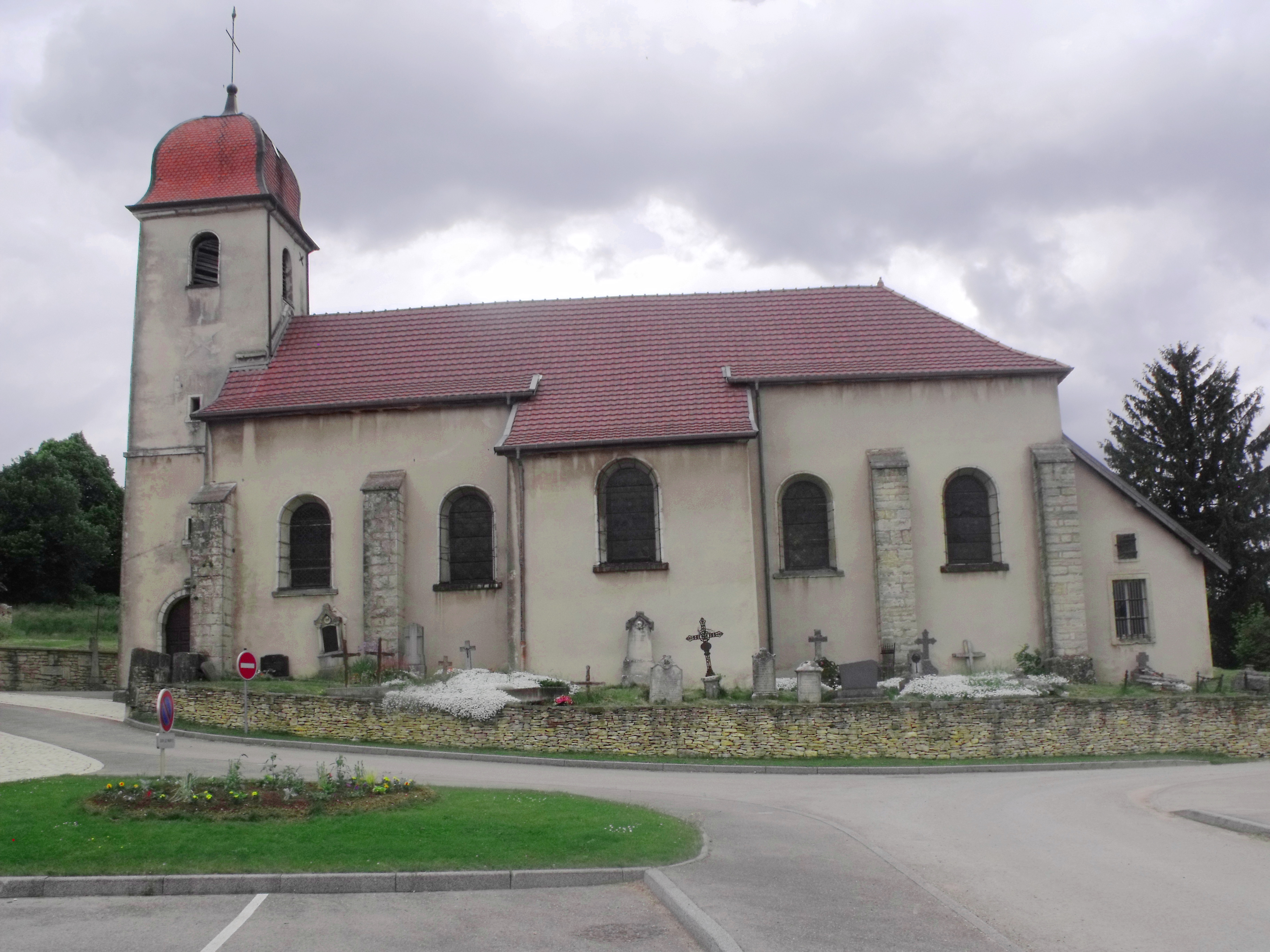 Eglise de Goux les Dambelin, Doubs, France